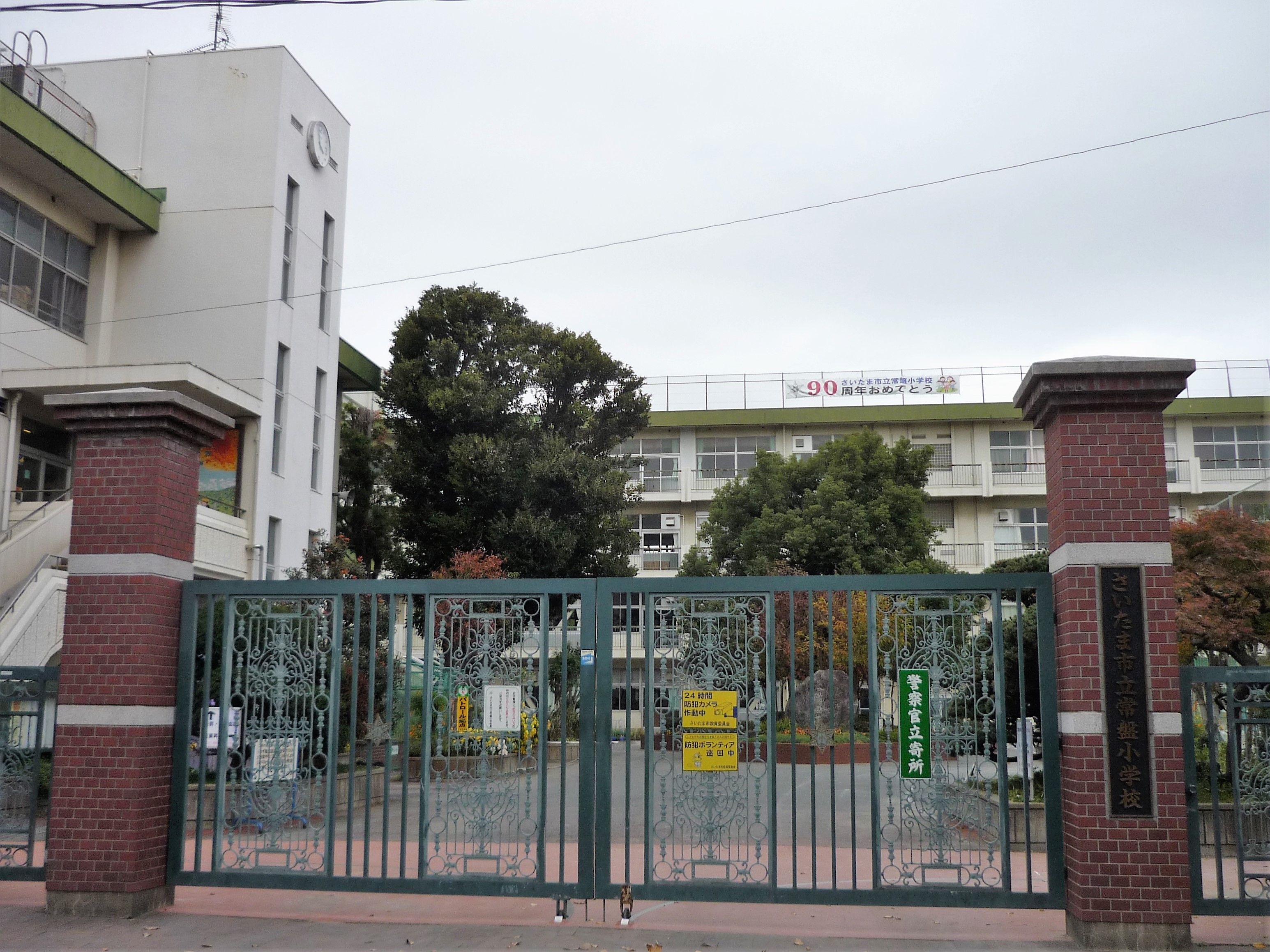 さいたま市立常盤小学校 Panasonic Lumix DMC-FS3